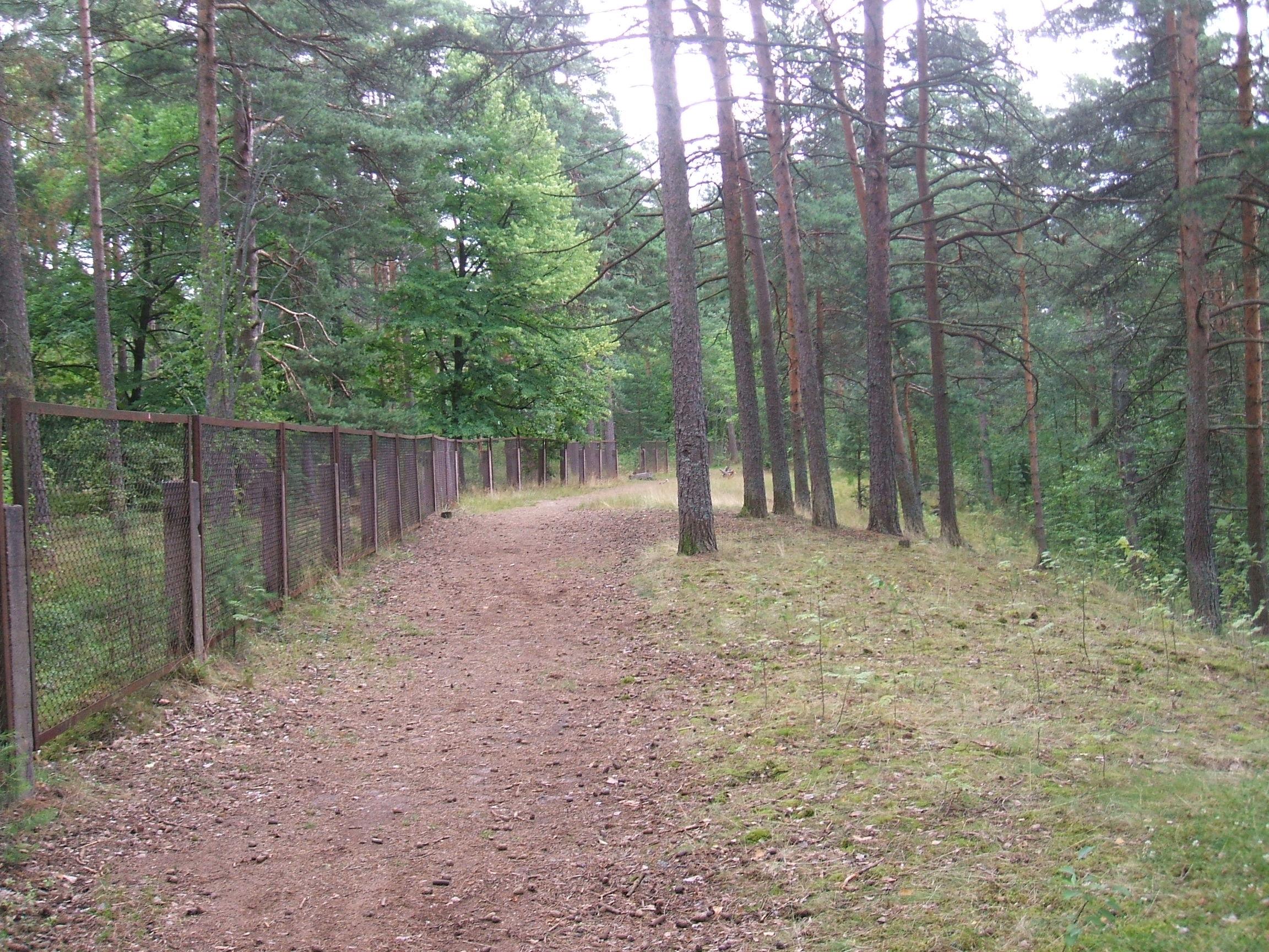 Дома Каунис и Тойволо Дома Каунис и Тойволо